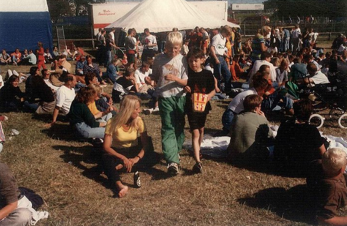 Stemning på Dyreskuepladsen 1996